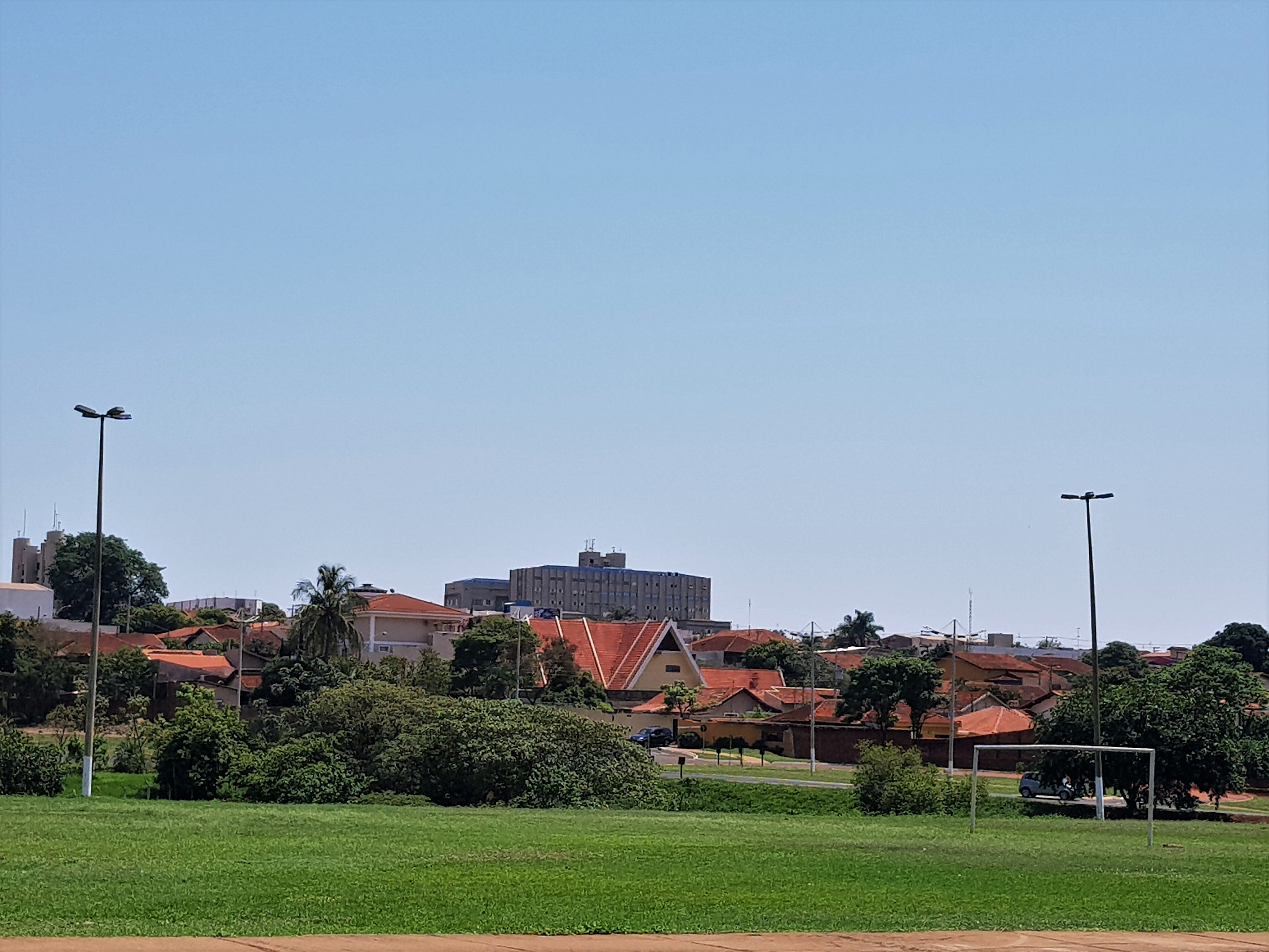 Vista da Santa Casa de Misericórdia de Barretos, em destaque no horizonte da cidade